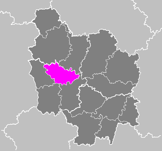 Maps of arrondissements and cantons of France: Arrondissement de Clamecy.PNG (Région Bourgogne)